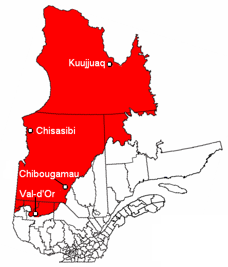 Carte du Nord du Québec (territoire visé par la Convention de la Baie-James et du Nord québécois de 1975); Adaptée de "Image:Quejam2.PNG"